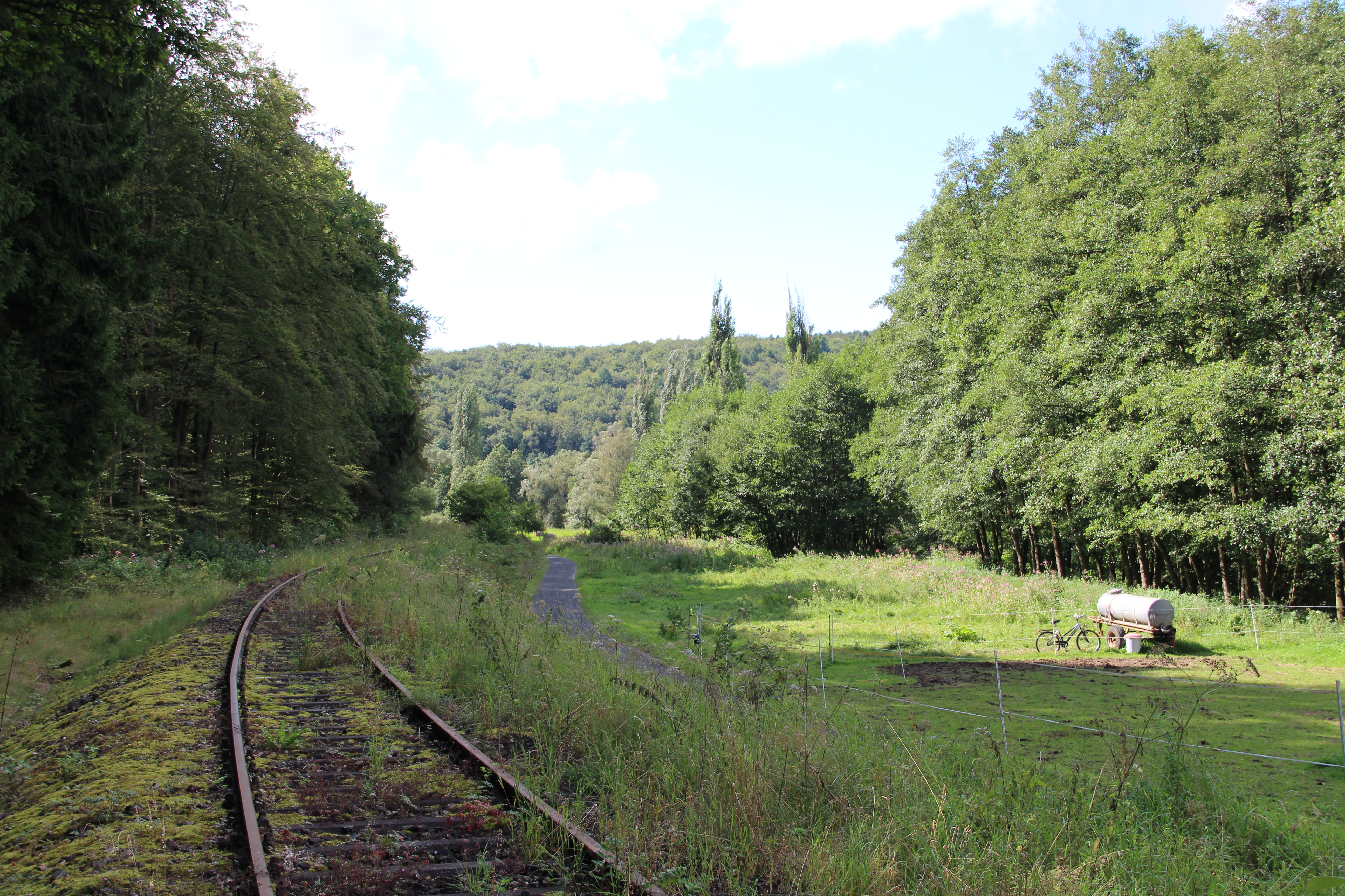 Abschnitt der Lumdatalbahn zwischen Treis und Mainzlar (Blickrichtung Mainzlar). Rechts der Gleise der Radrundweg Lumda - Wieseck